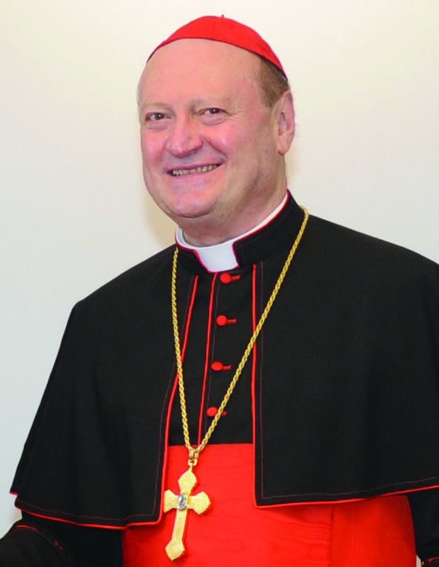 Heydər Əliyev Fondu ilə Müqəddəs Taxt-Tac arasında “Roma katakombalarının bərpasına dair ikitərəfli Saziş”in imzalanması mərasimi. 22 iyun 2012-ci il.